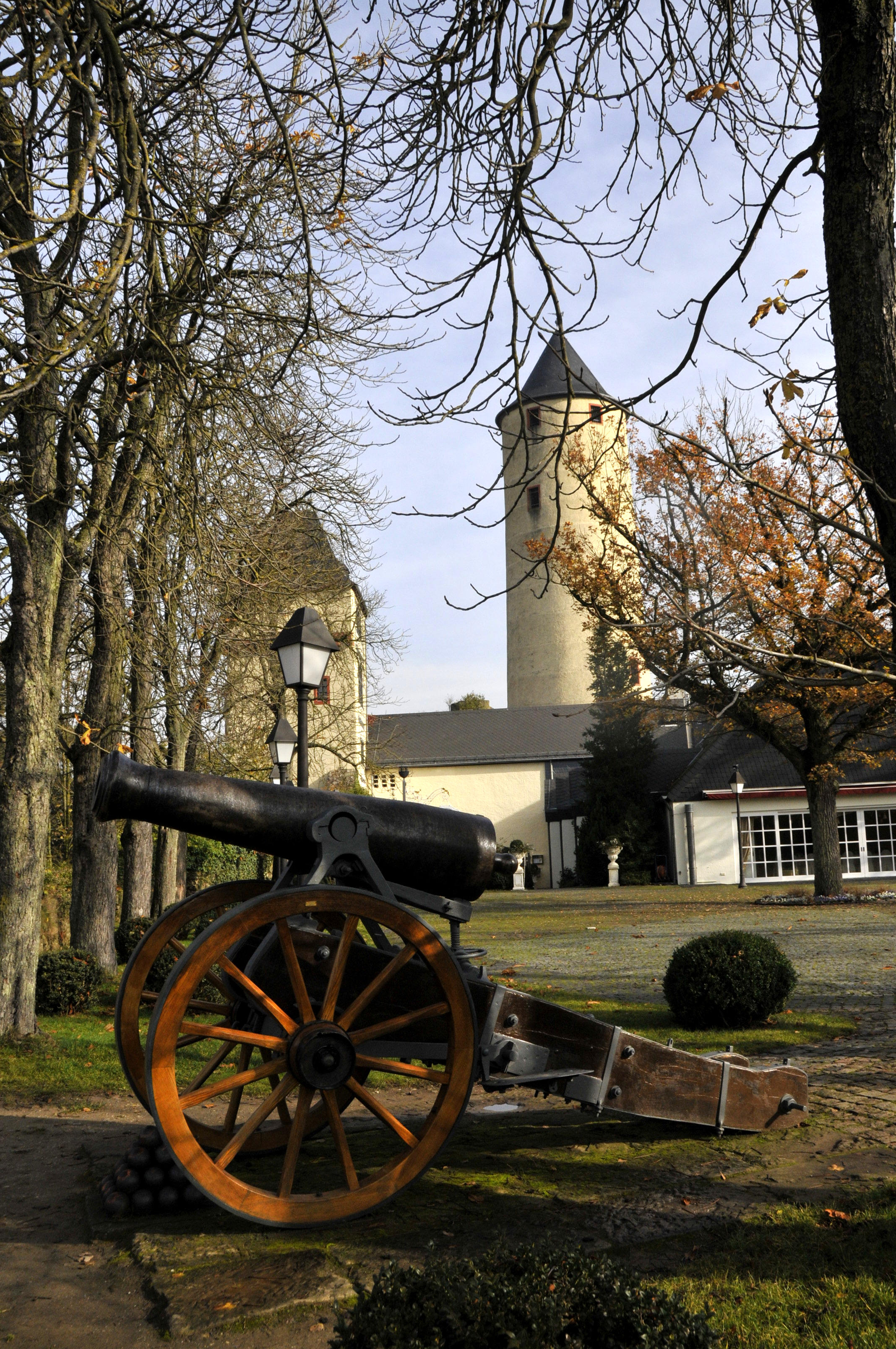 Stromburg, Kanone im Burggarten